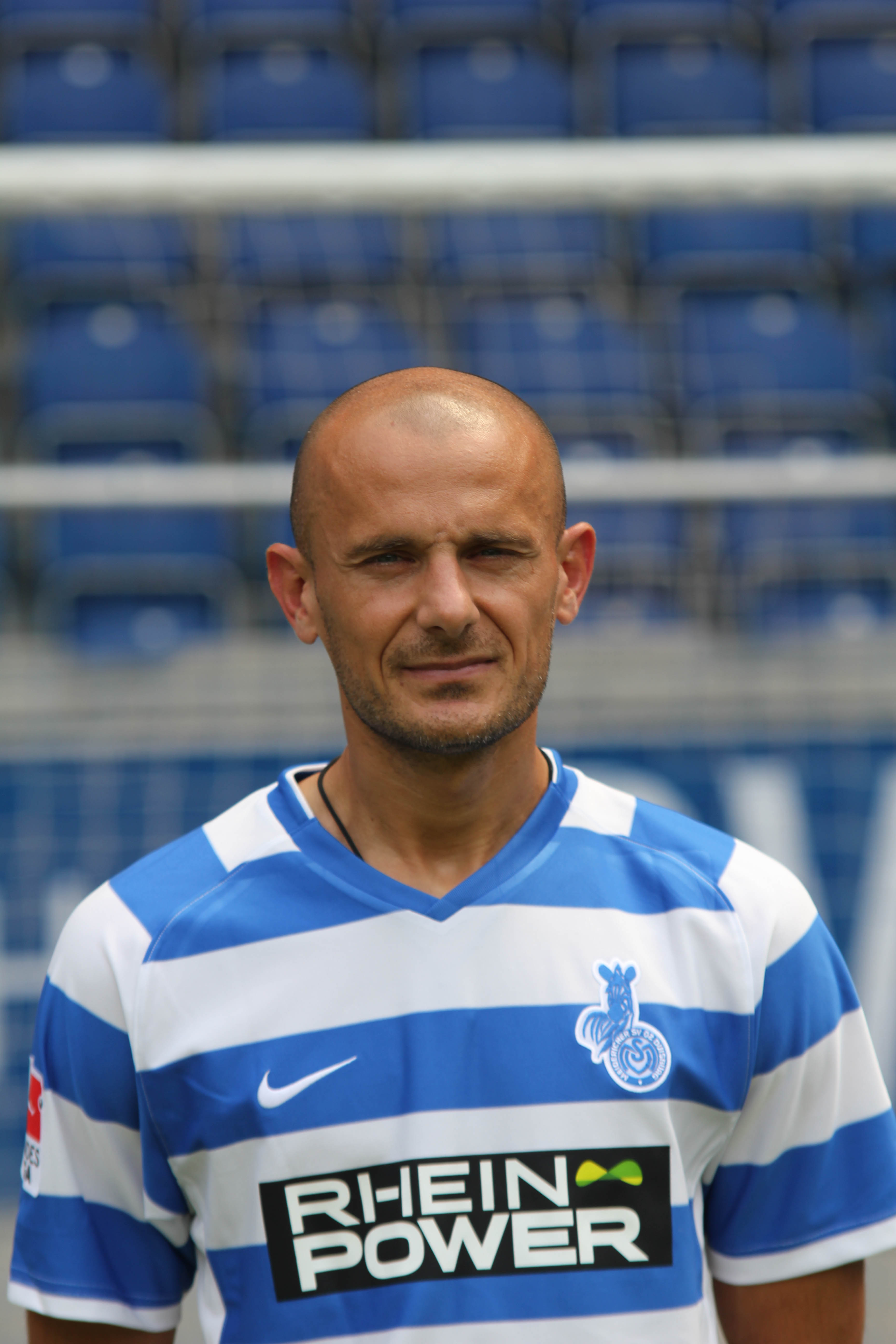 Serbian footballer Srđan Baljak, MSV Duisburg